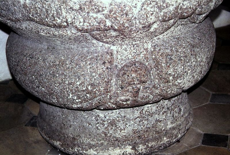 Vester Egede Kirke i Danmark. Vester Egede kirke, døbefont